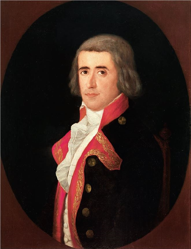 Retrato del aristócrata español